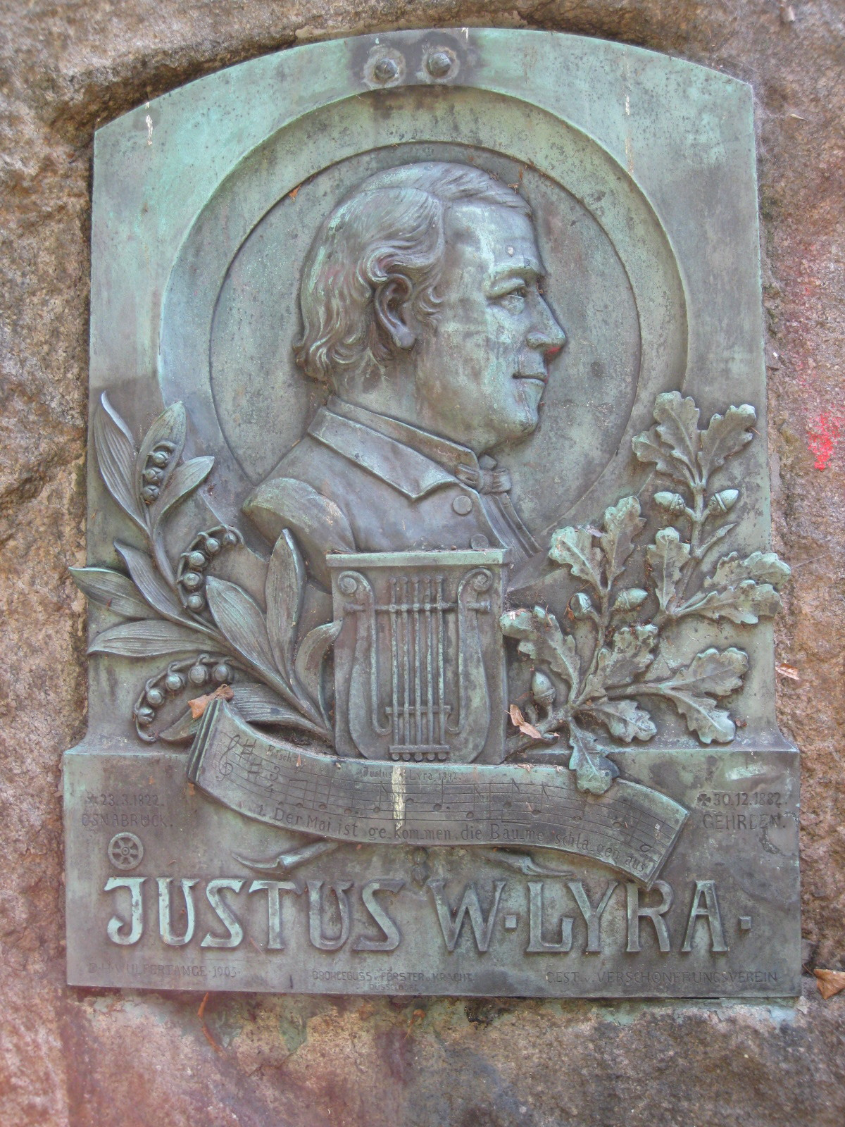 Justus Wilhelm Lyra, dargestellt auf einer von Rudolf Wulfertange angefertigten Plakette auf dem Lyra-Denkmal in Osnabrück